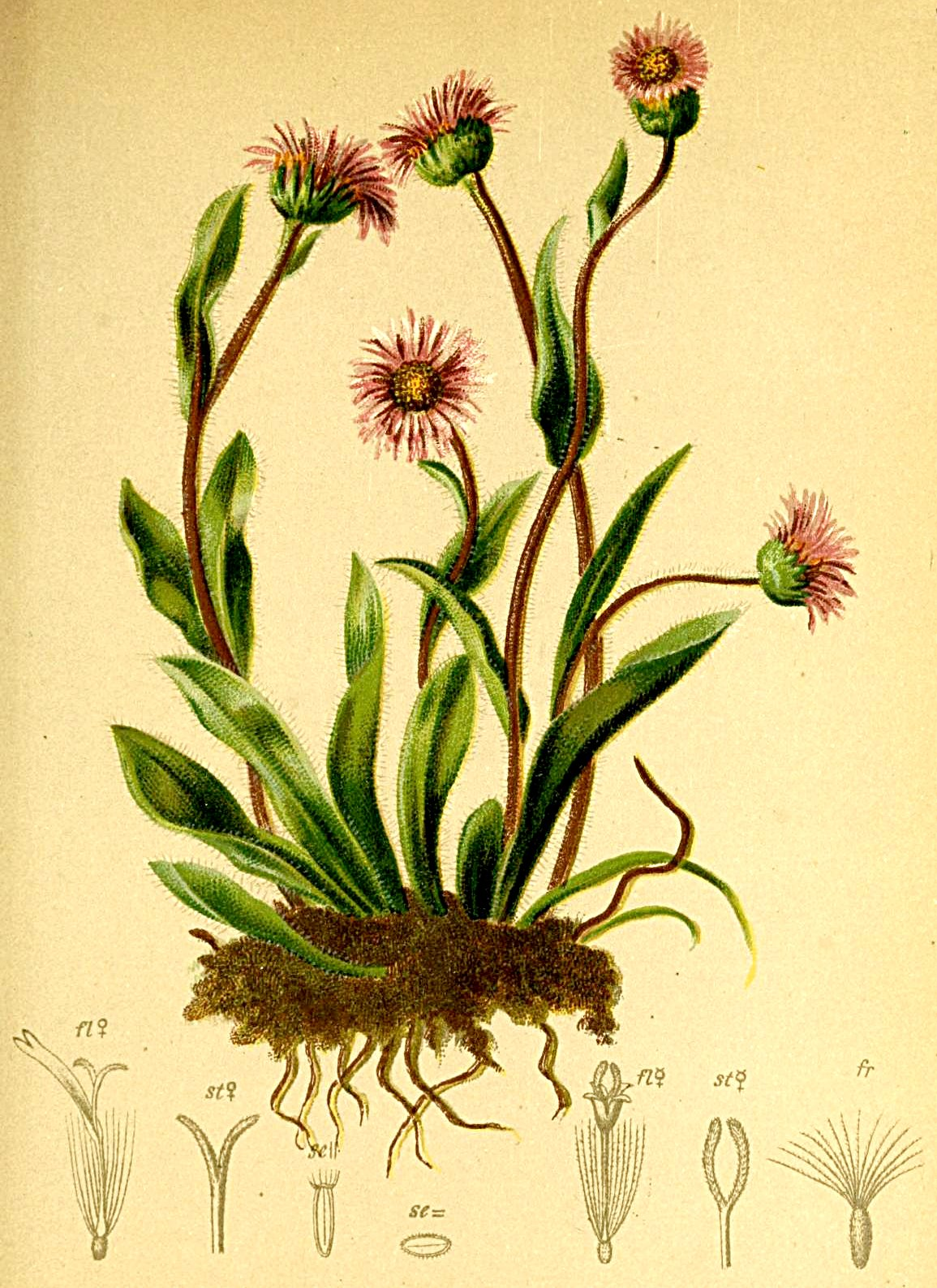 Erigeron alpinus